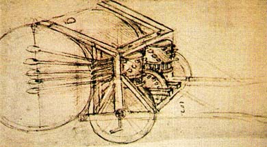 рисунок Леонардо да Винчи - Военный барабан